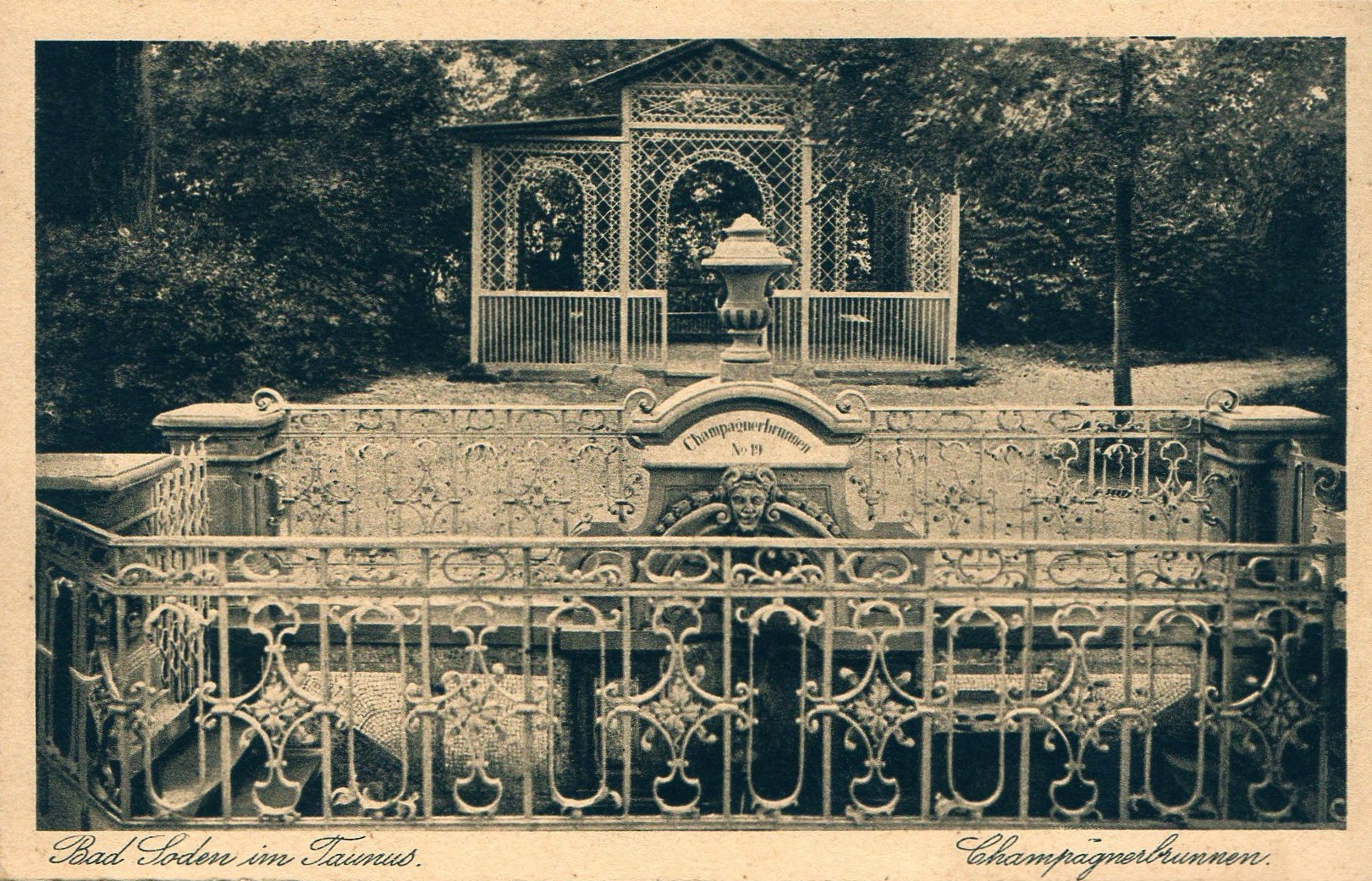 Bad Soden am Taunus Champagner Brunnen